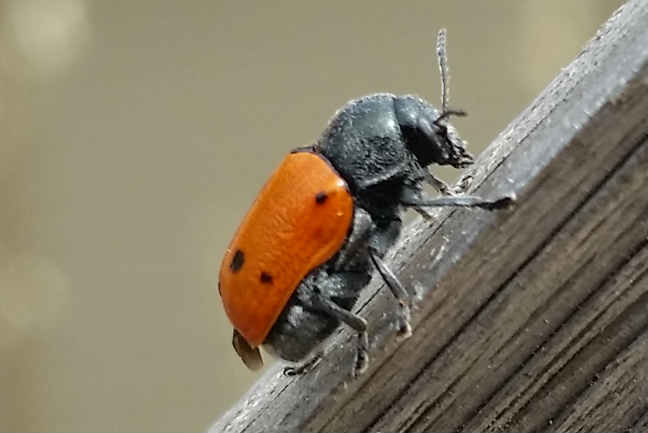 Cryptocephalus trimaculatus am 21.6.2016 an der Côte d’Azur